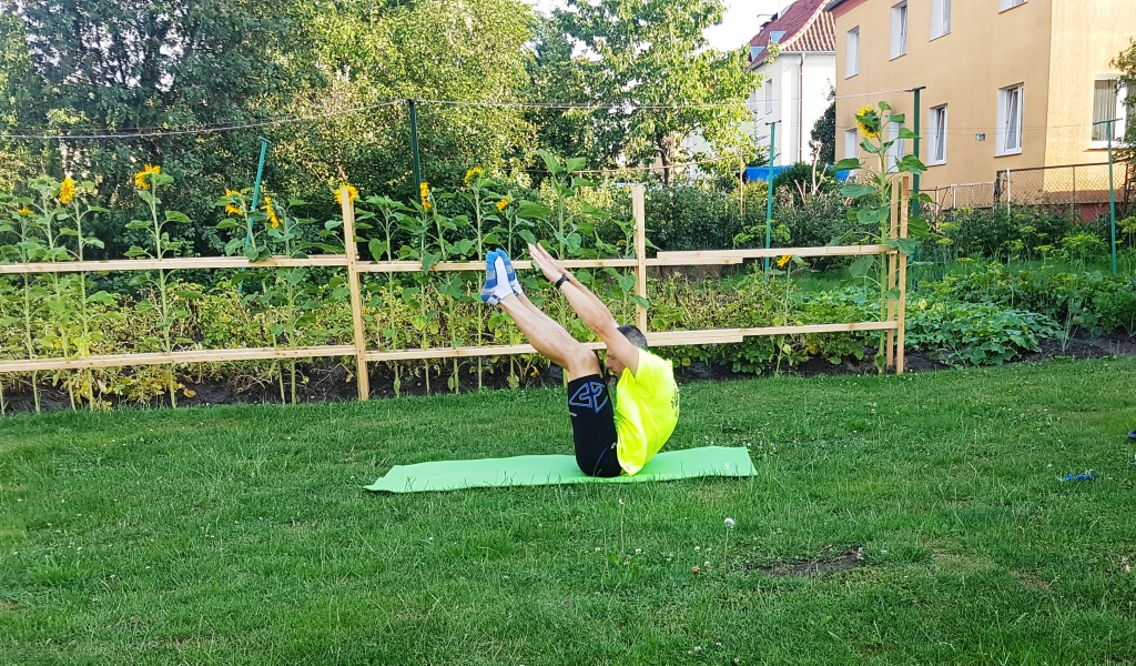 scyzoryki Jackknife (exercise) Klappmesser